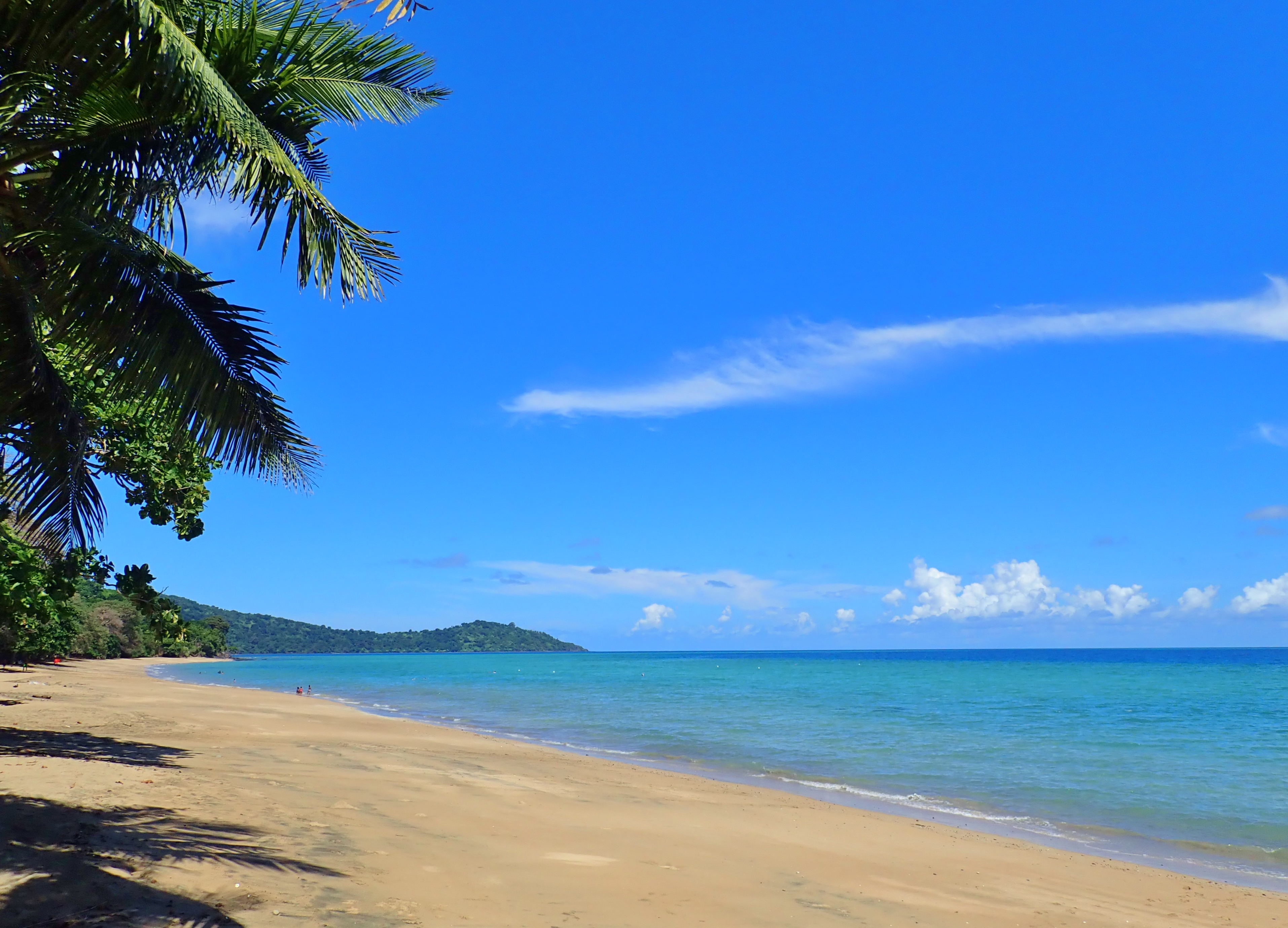 Plage de N'gouja (commune de Kani-Kéli), vue de l'ouest.